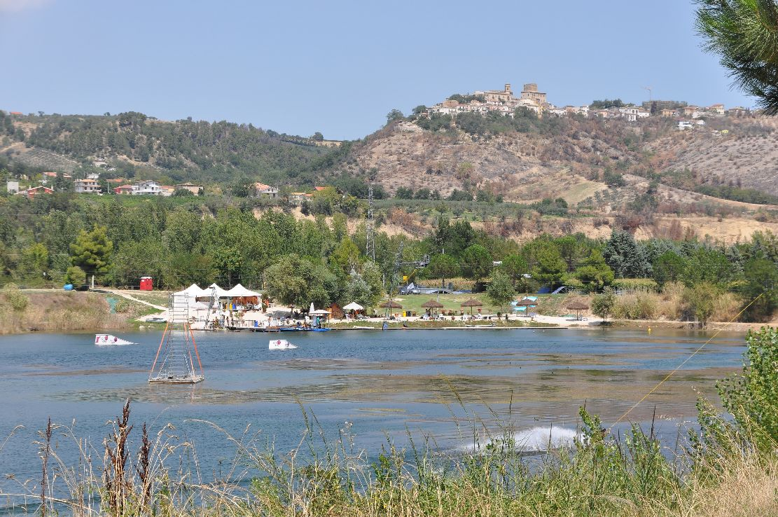 Manoppello Hot-Lake 2012